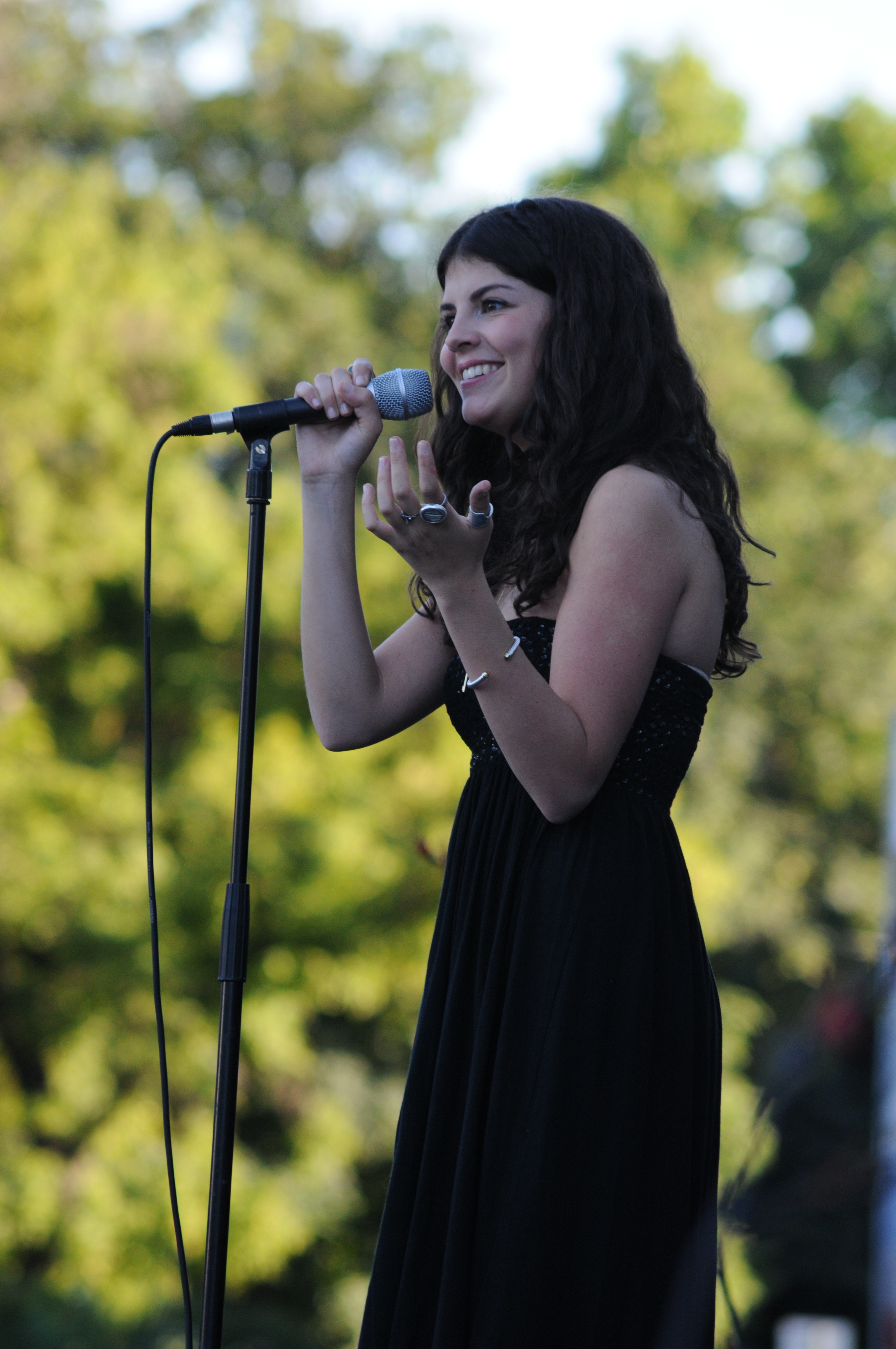 Nikki Yanofsky Jazz Fest Wien 2010 (Wiener Rathaus)